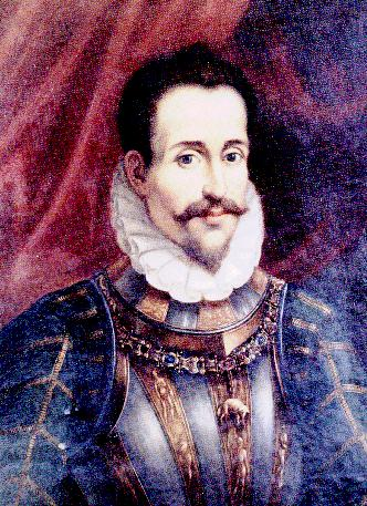 Ottavio Farnese duca